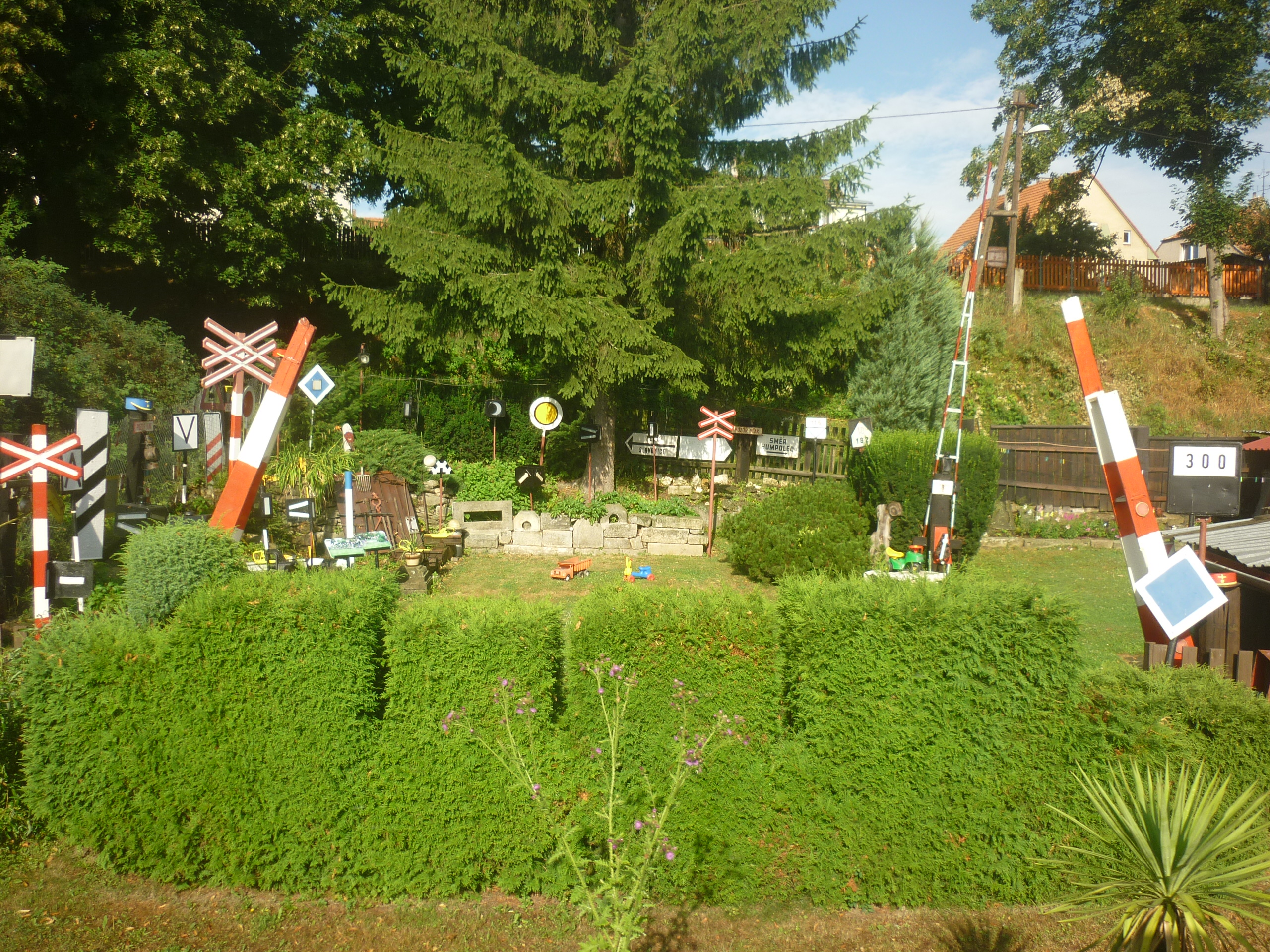 Hodice - železniční zastávka - muzeum